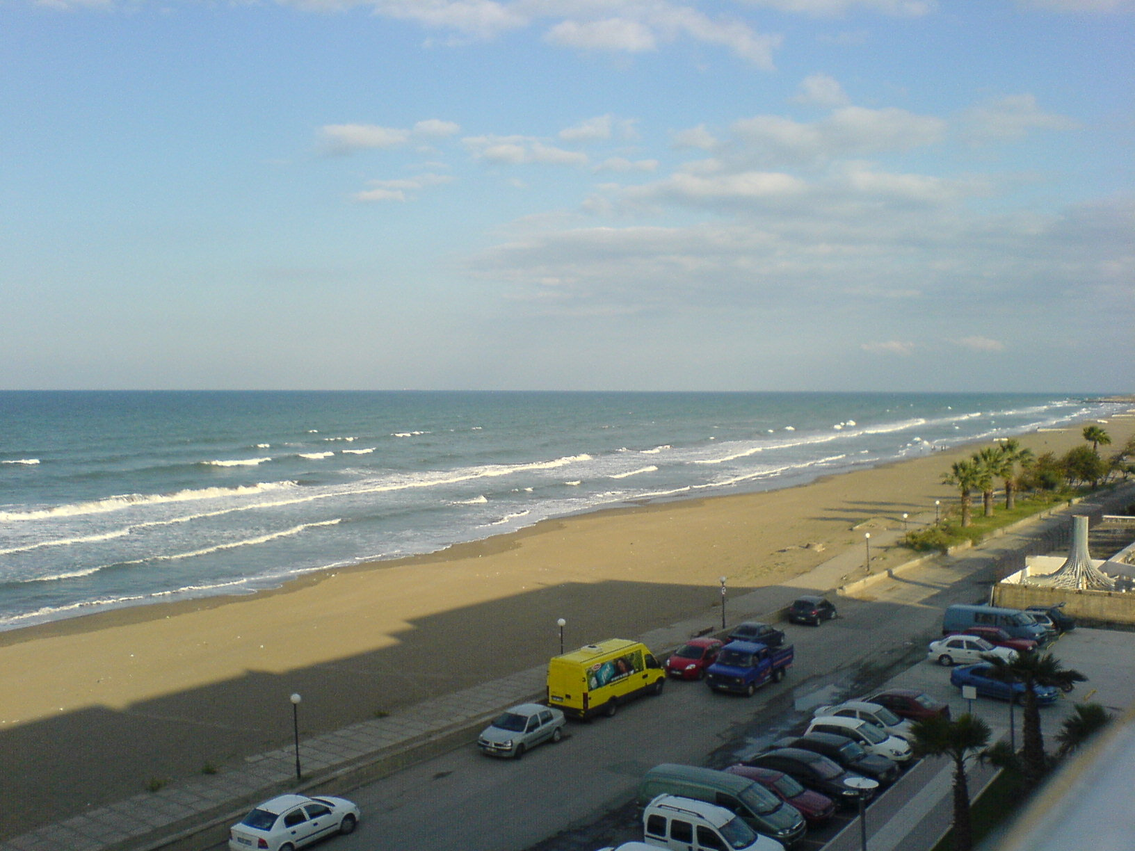 Samsun Atakum Yeşilyurt